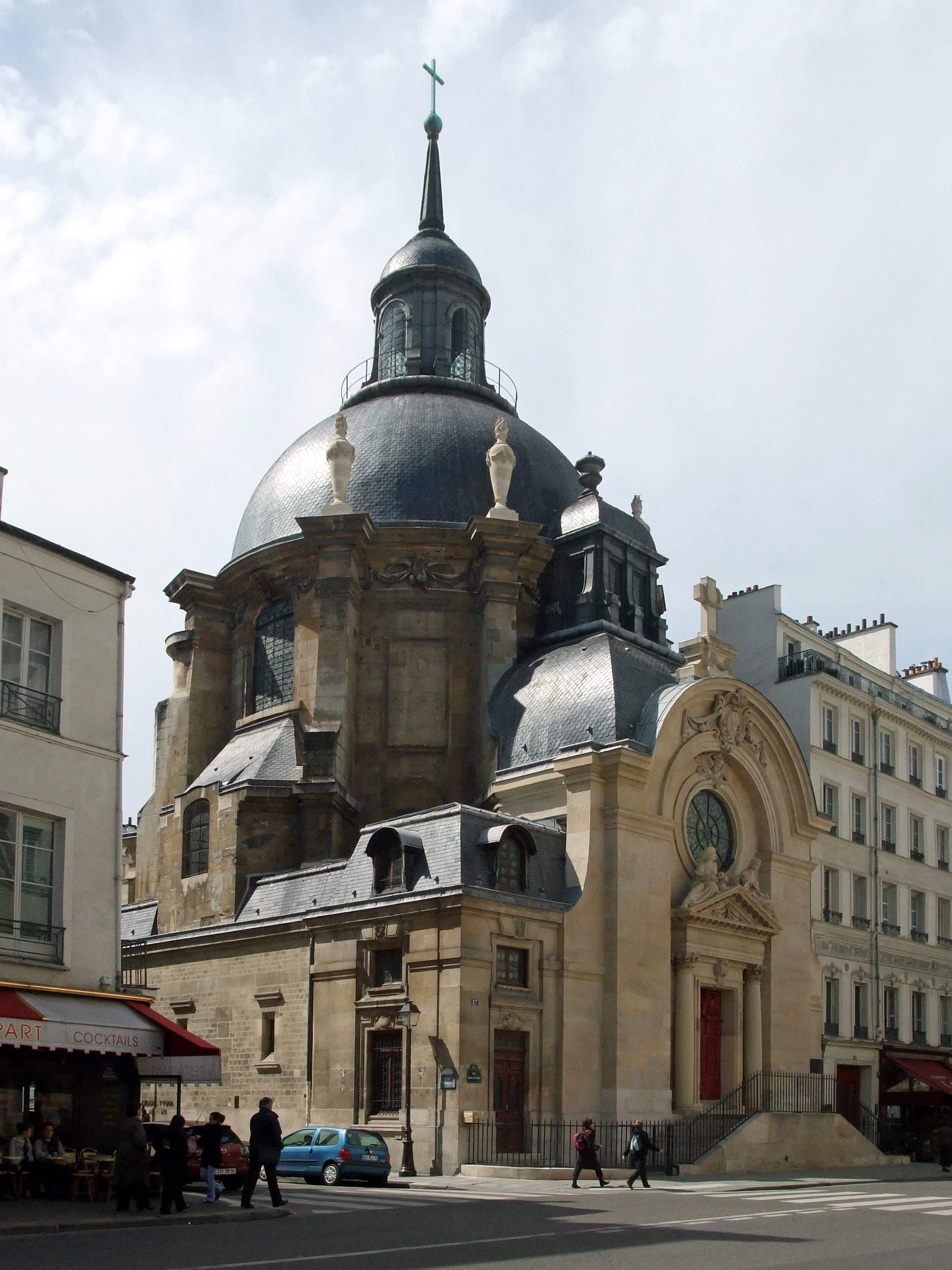 Le Temple Sainte-Marie de la rue Saint-Antoine à Paris